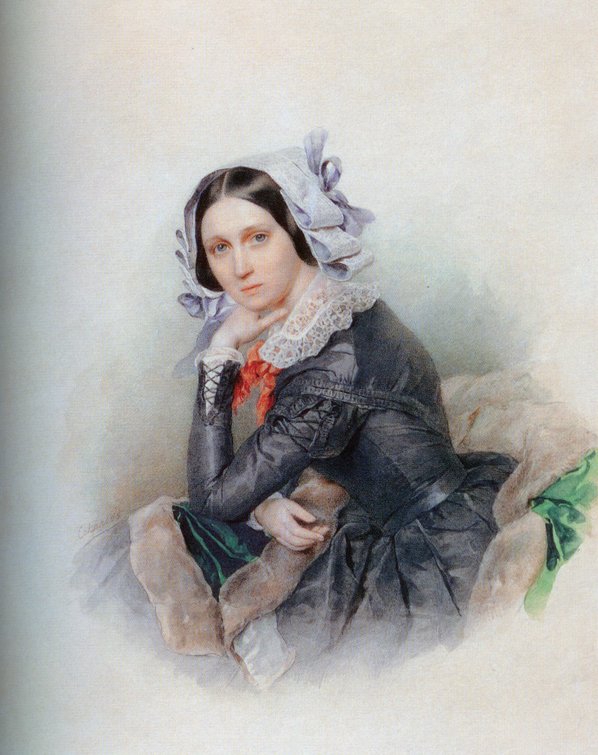 Аделаида (Аглая) Павловна Голицына, ур. Строганова (1799—1882)- фрейлина, кавалерственная дама ордена св. Екатерины меньшего креста, с 1821 года жена князя В.С.Голицына.